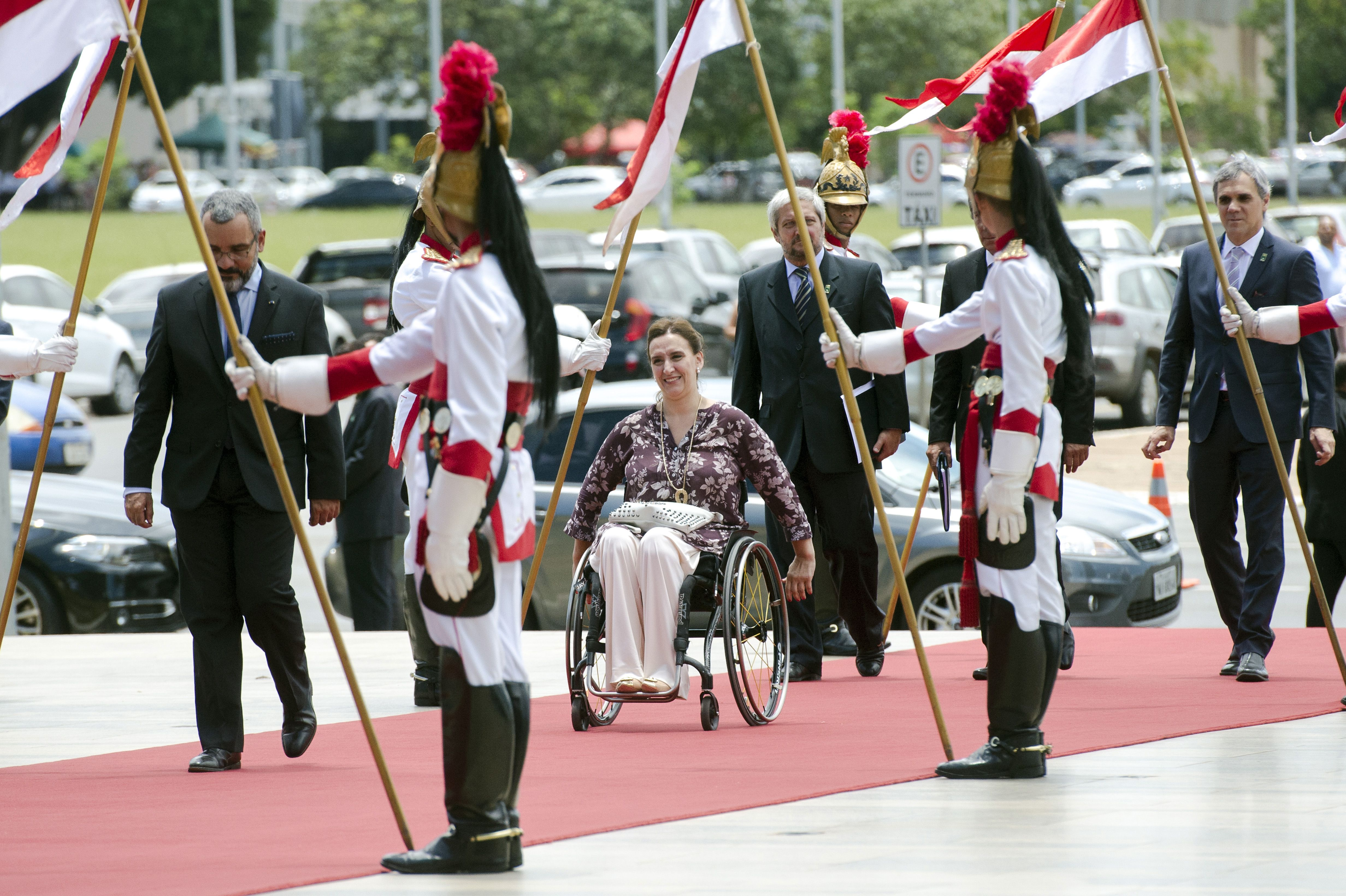 Brasília - A vice-presidenta da Argentina, Gabriela Michetti, chega para encontro com o vice-presidente da República do Brasil, Michel Temer, no Palácio Itamaraty.